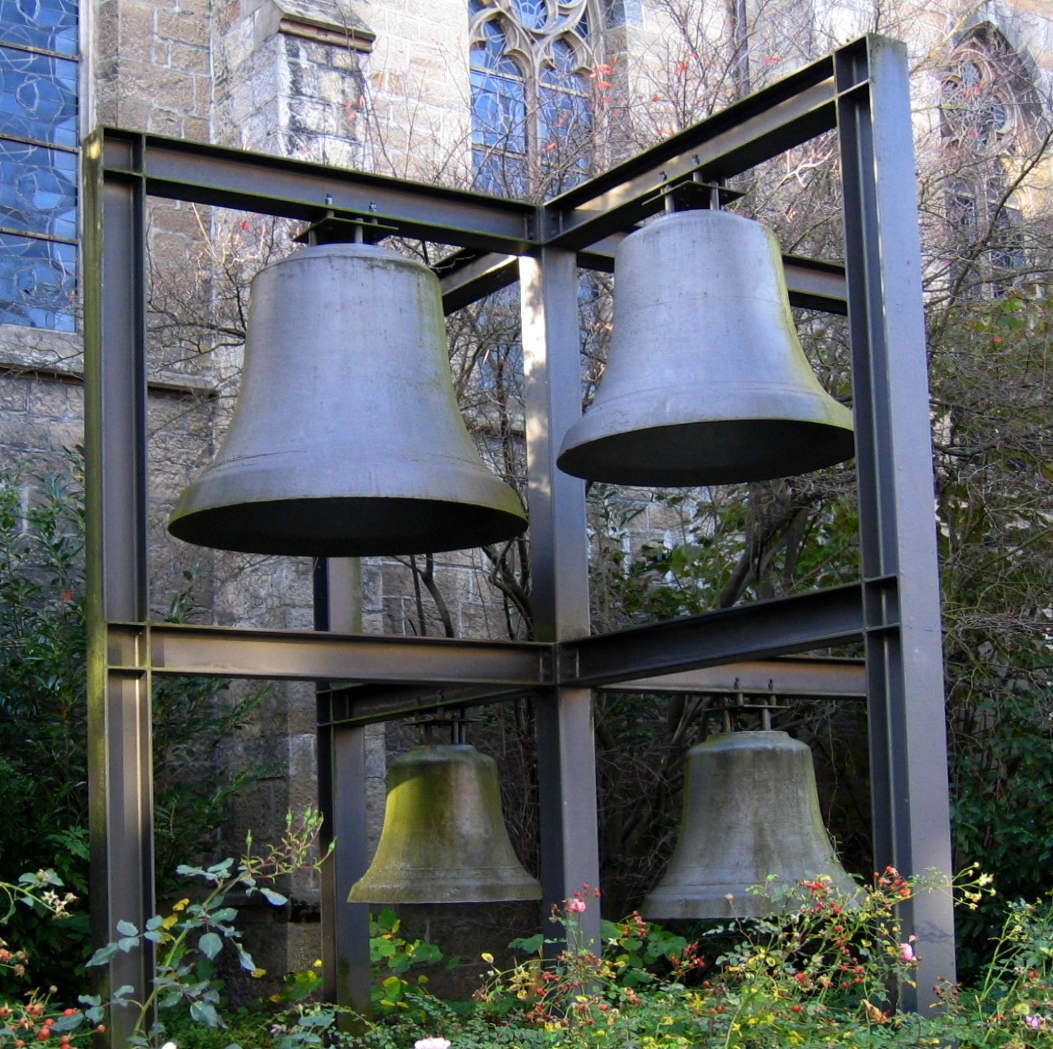 Description: Historische Stahlgussglocken von 1918 (Gebr. Ulrich, Apolda in Thüringen) vor der Pfarrkirche St. Johannes in Sundern Source: selbst fotografiert Date: 31. Okt. 2005 Author: Bubo